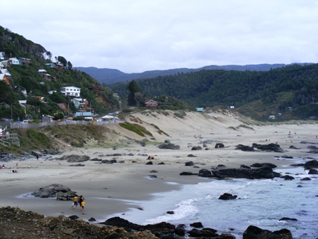 Vista de las casas en el cerro y parte de la playa. Pucatrihue, comuna de San Juan de la Costa, Provincia de Osorno, Chile.